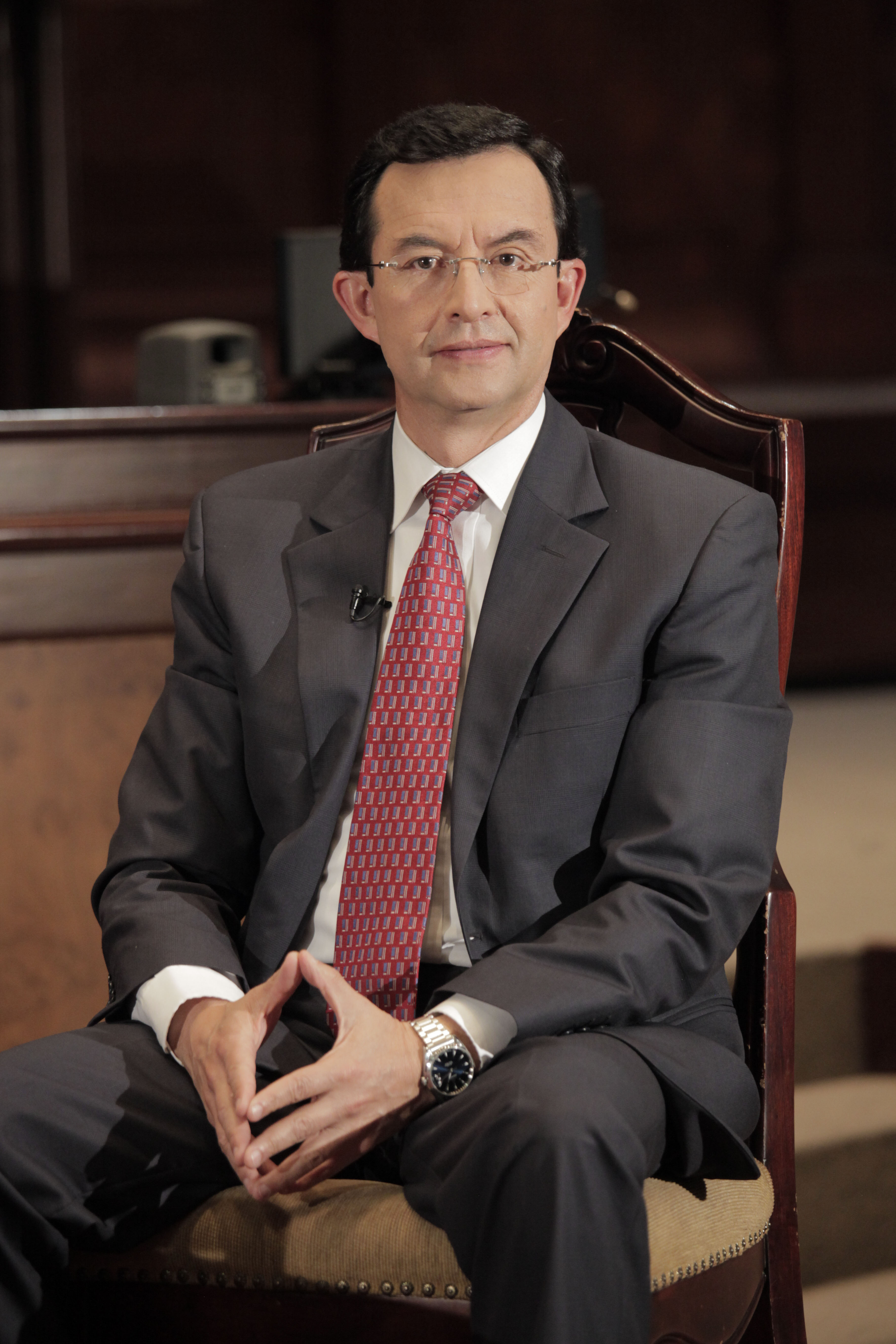 09 de noviembre de 2015 - Programa de Ecuador Tv "Ciudadanizando las Enmiendas" Tema: Ecuardor Tv entrevista a los asambleistas: Rosana Alvarado y Luis Fernando Torres. Fotografía: Alberto Romo / Asamblea Nacional